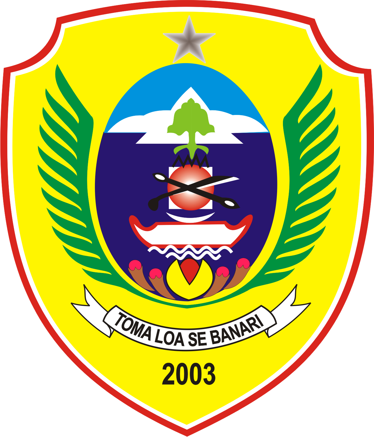 Lambang Kota Tidore Kepulauan